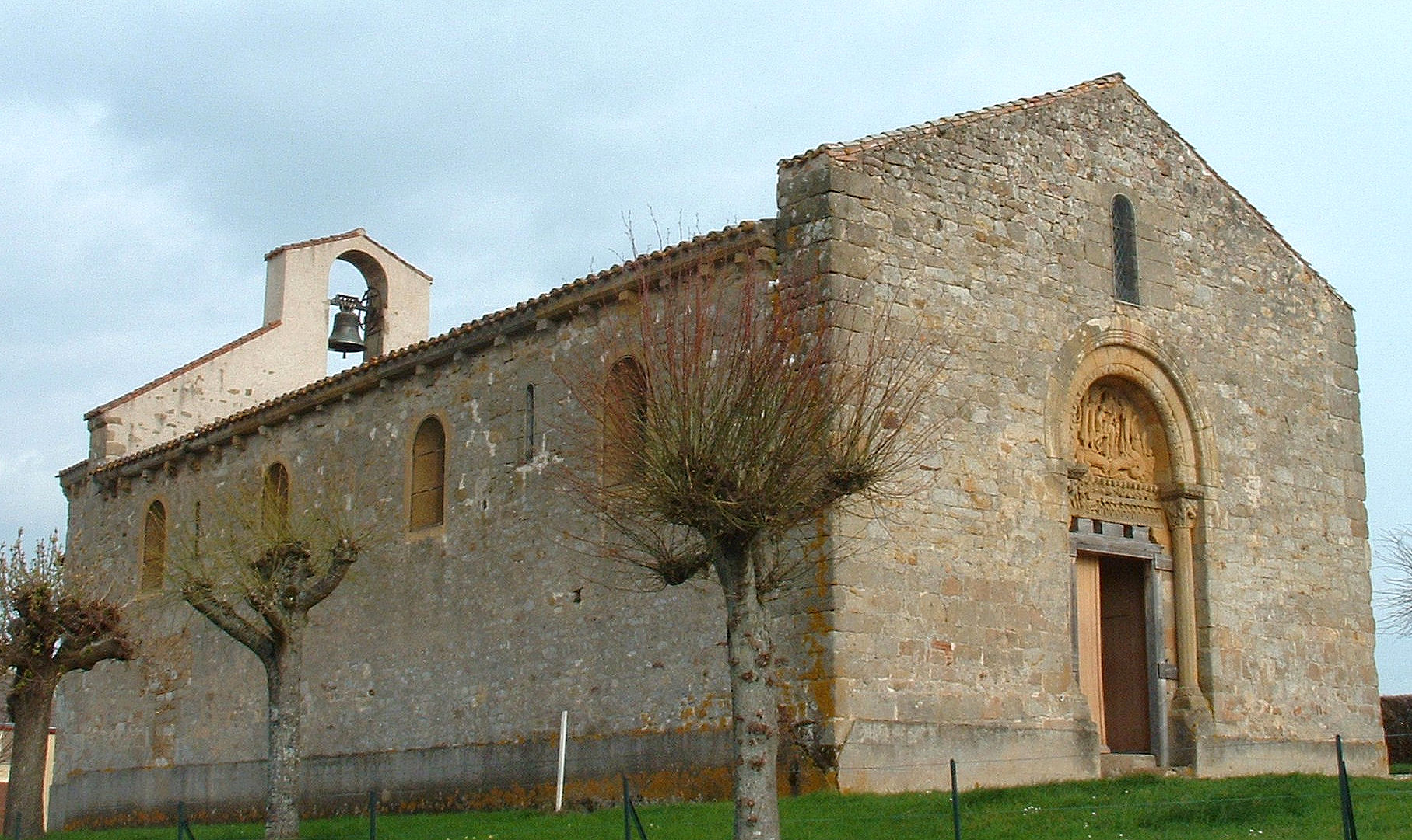 Neuilly-en-Donjon - Eglise Sainte-Madeleine